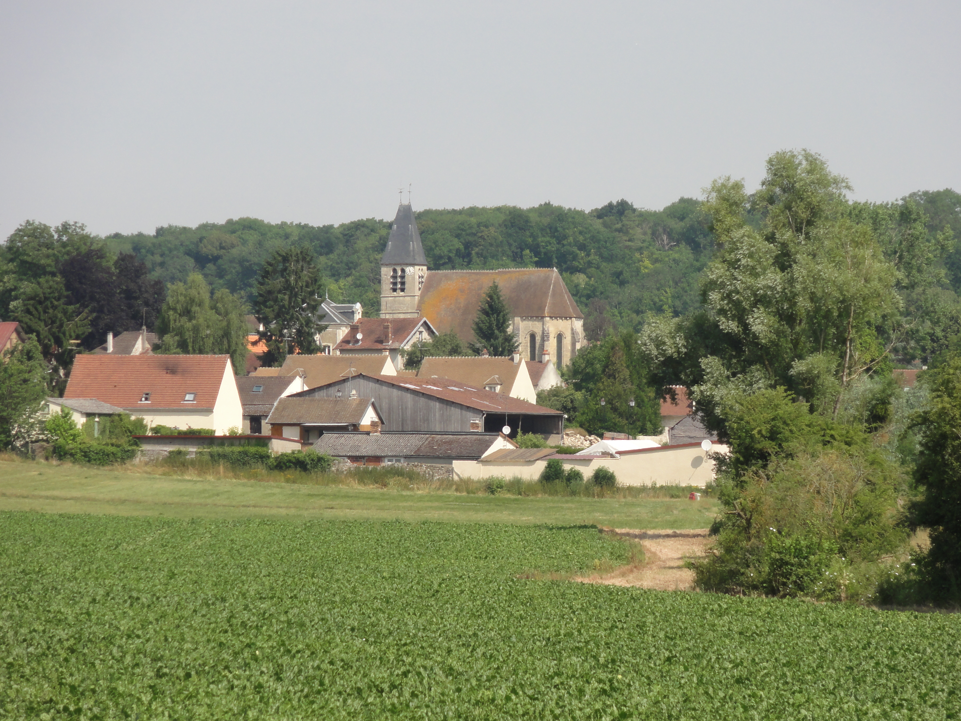 Vue sur le village depuis le sud.